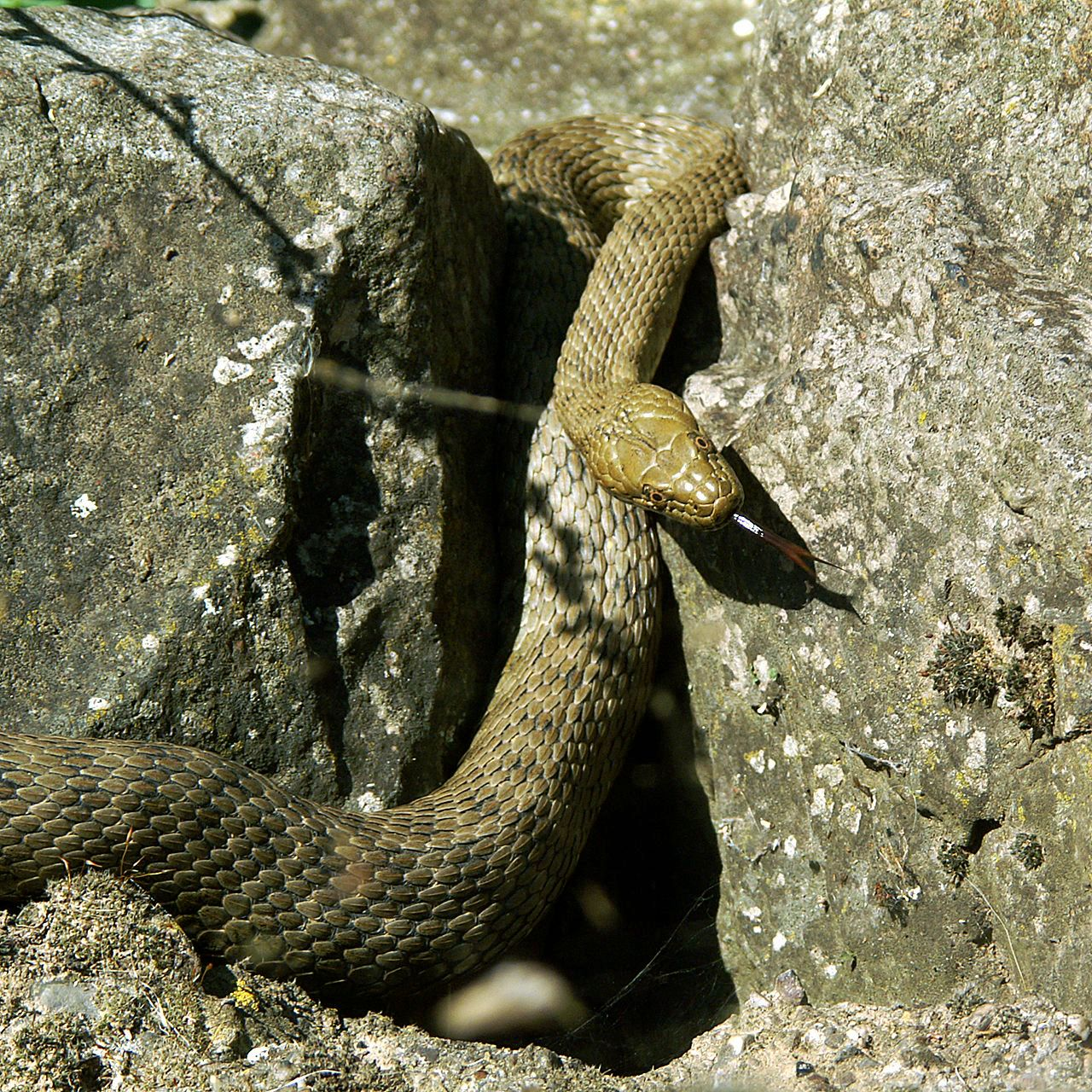 Natrix tessellata